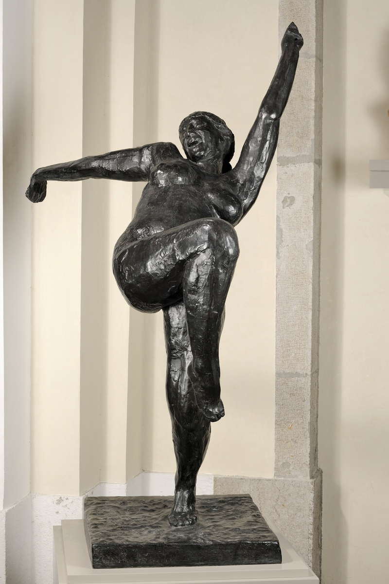 Peinture